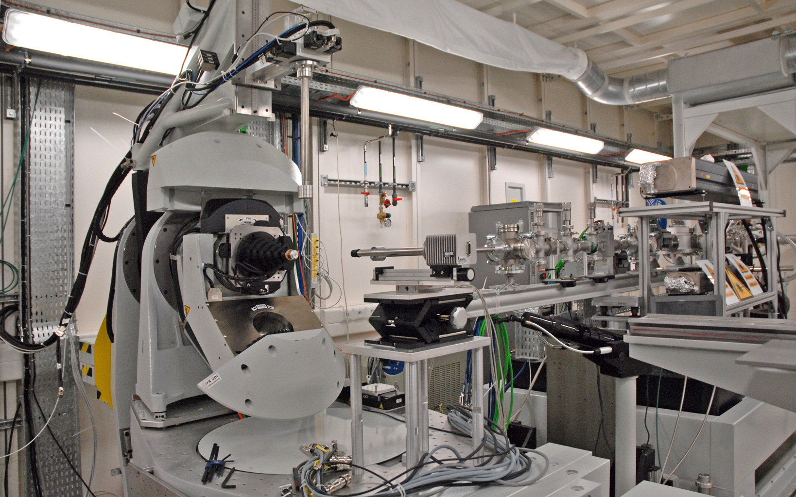 Appareils de mesure de la ligne de lumères DIFFABS sur le synchrotron SOLEIL situé sur le plateau de Saclay en région parisienne (France) La palette des techniques instrumentales utilisables sur la ligne DIFFABS s'adresse à de nombreux secteurs de recherche fondamentale et finalisée (industrie du pétrole, secteur du nucléaire, métallurgie) parmi lesquels la science des matériaux et la chimie tiendront une place prépondérante. En particulier les études de transformations in-situ dans des matériaux portés à de très hautes températures seront le domaine d'excellence de la ligne. L'intérêt des mesures couplées de diffraction sur poudres ou monocristaux et d'absorption est de garantir que les deux expériences sont effectuées sur la même zone de l'échantillon, dans des conditions physico-chimiques (température, pression, atmosphère réactive autour de l'échantillon) totalement identiques, ce qui est très important pour établir des corrélations entre les informations données par les deux type de mesures dans le cas de matériaux complexes ou en conditions extrêmes." IPANEMA utilise cette ligne pour l’étude de la circulation et du commerce des produits ferreux au Moyen Age